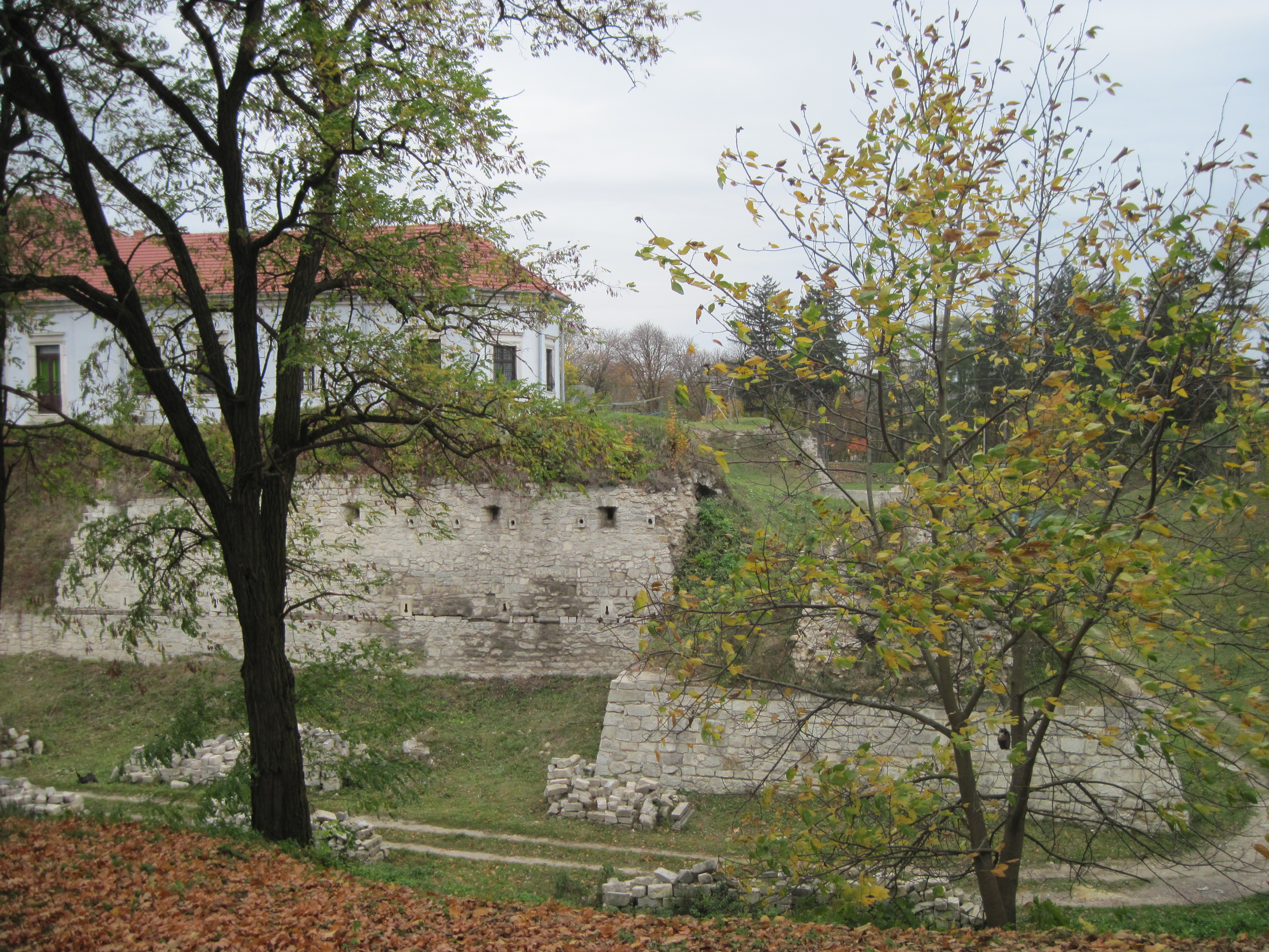 Збар. замок